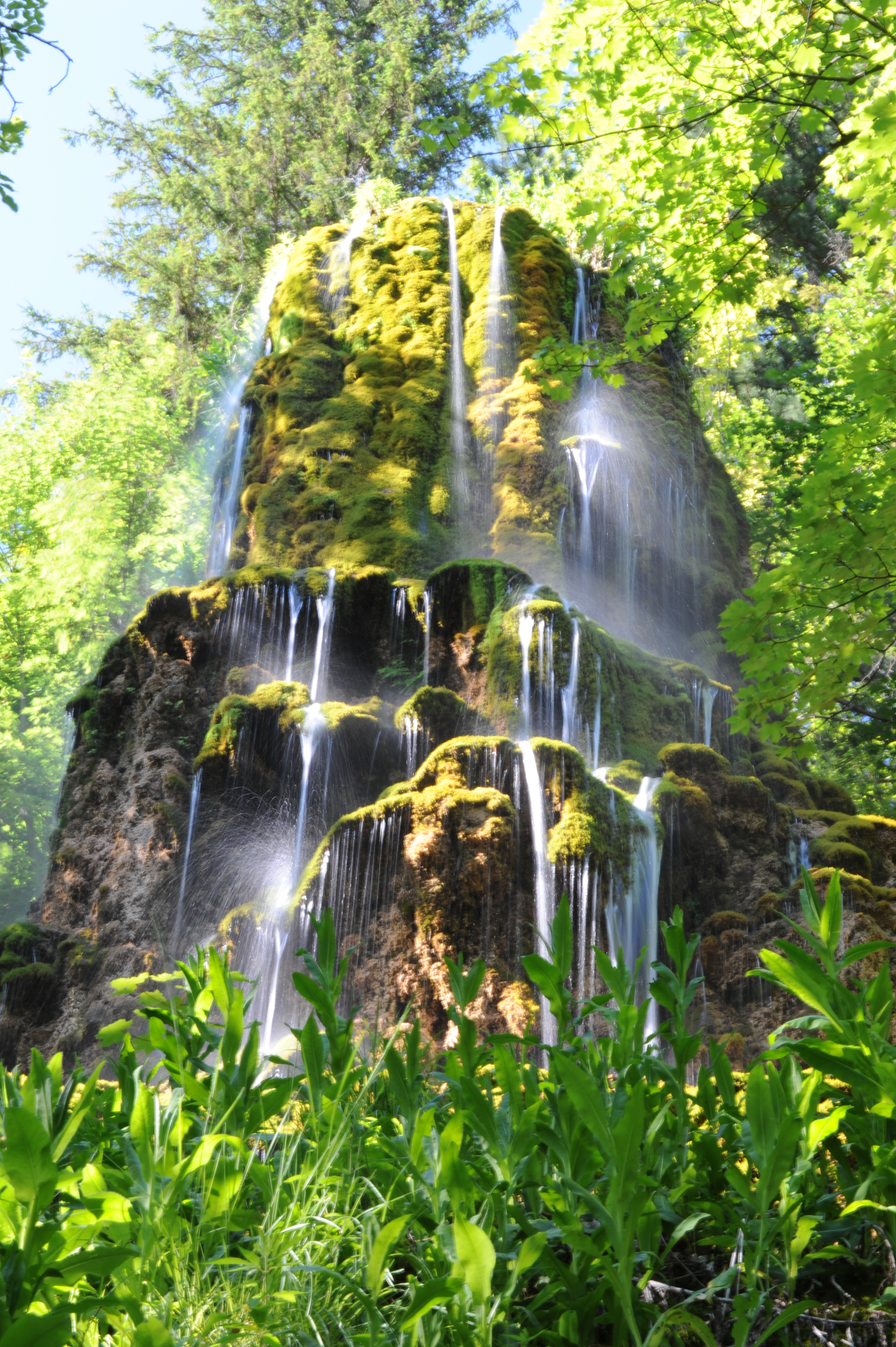 eau, cascade, goutte, grande cascade de la Réserve Naturelle Géologique de Haute-Provence